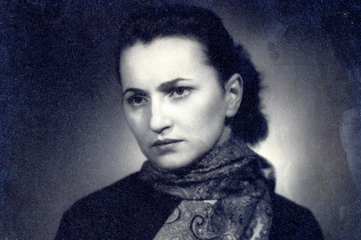 Česky: Fotografie herečky Ludmily Forétkové